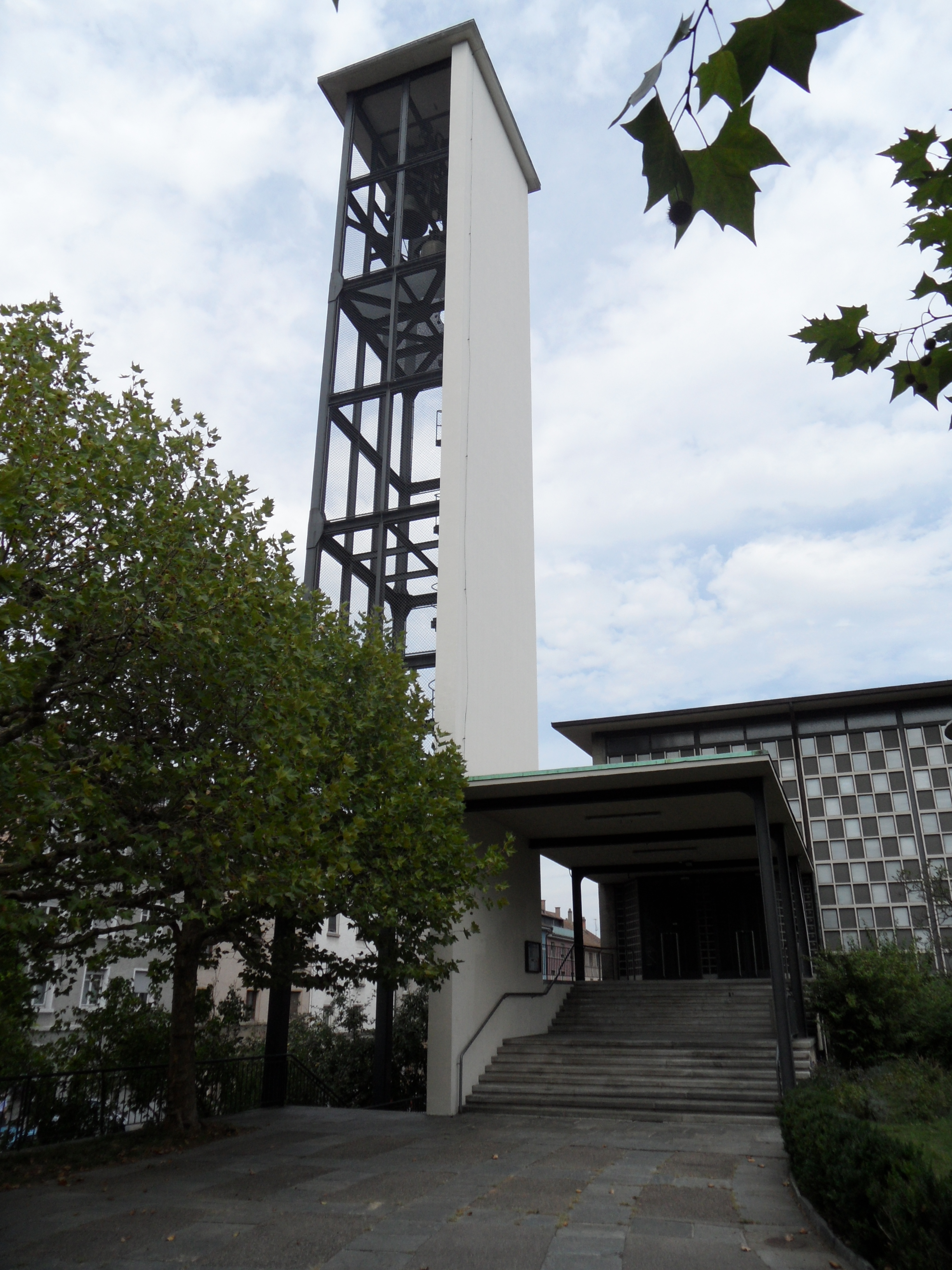 Eingang mit Turm der reformierten Johanneskirche